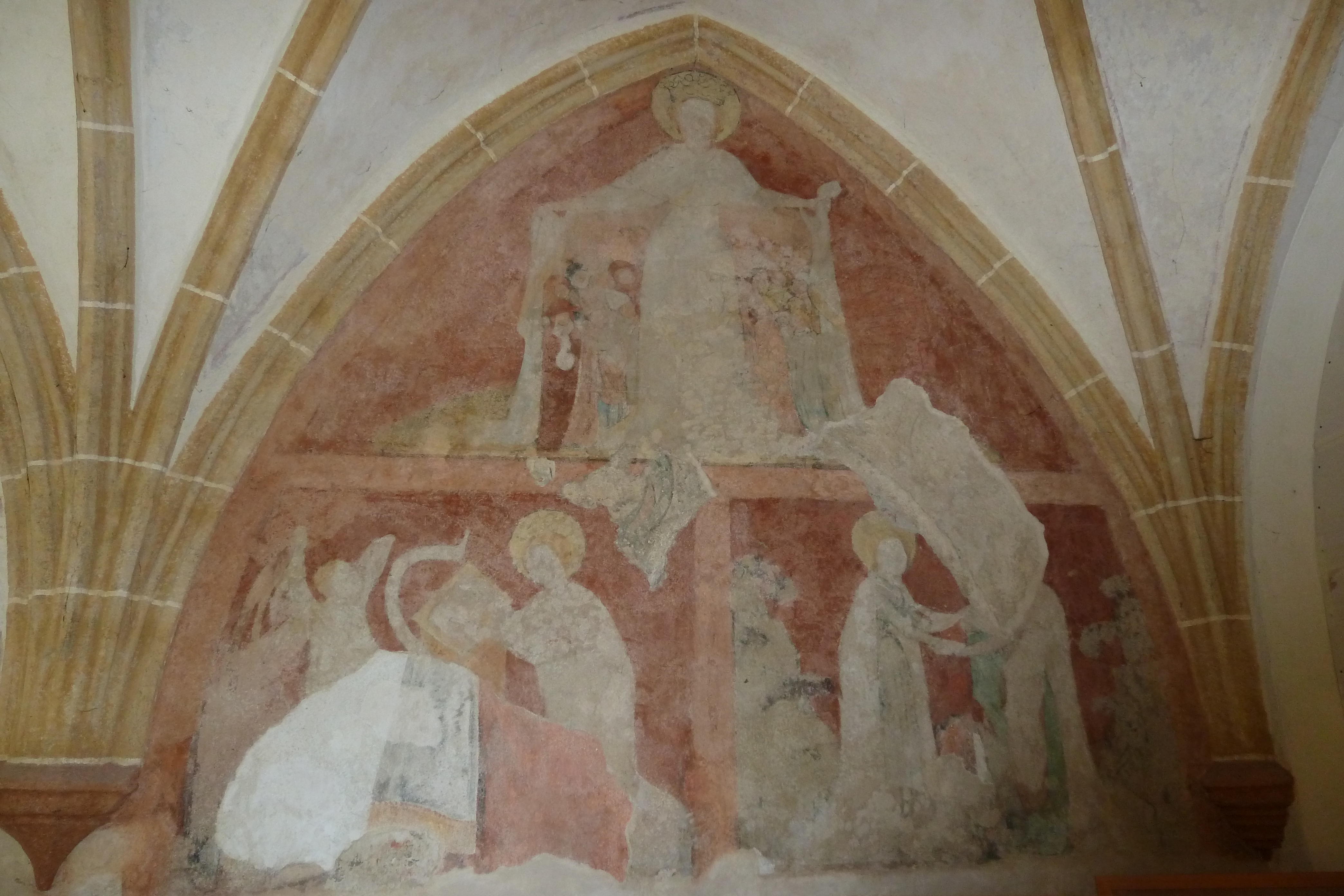 Obraz Panny Marie ochranitelské